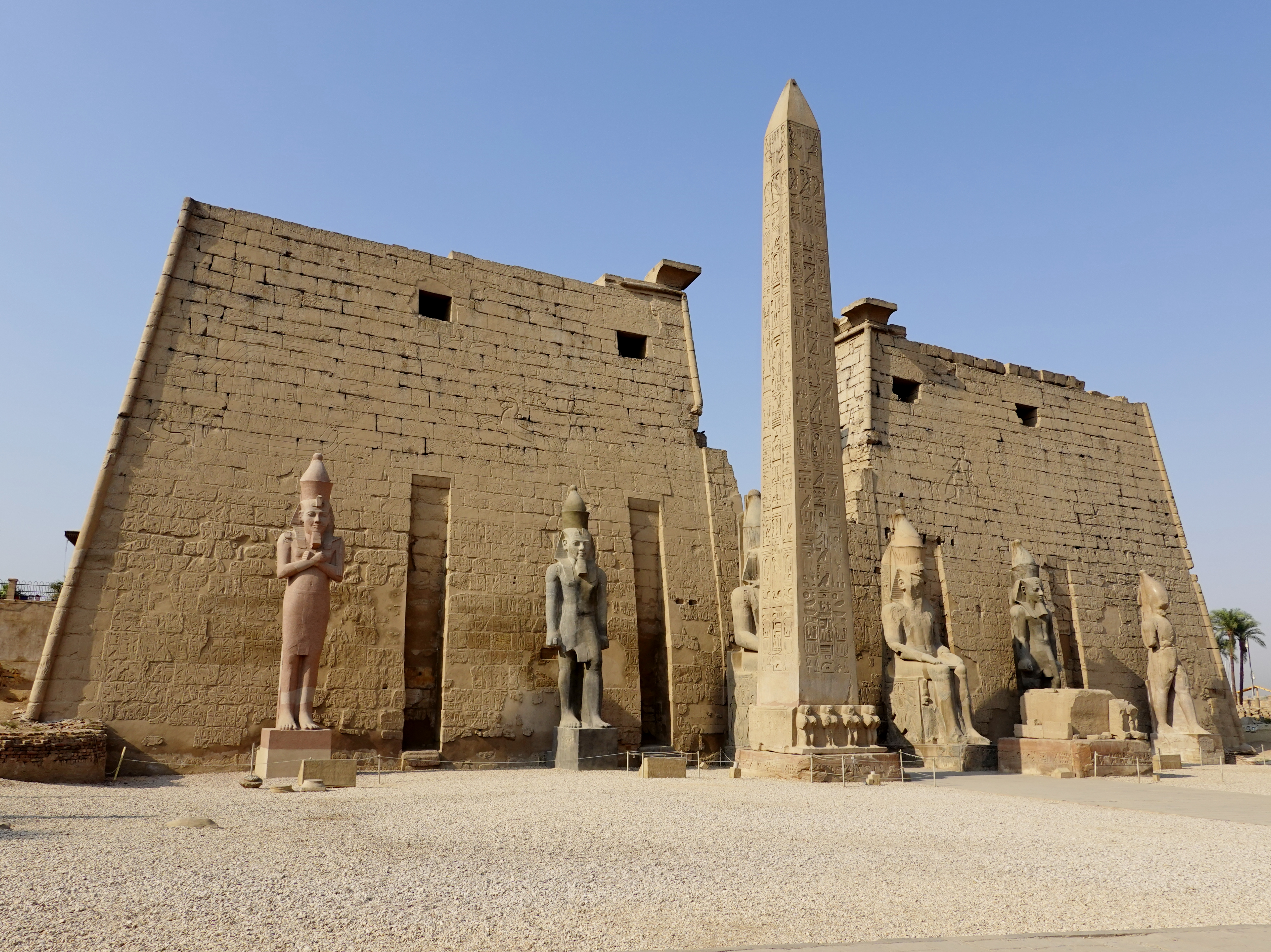 Pylon des Luxor-Tempels in Luxor, Ägypten